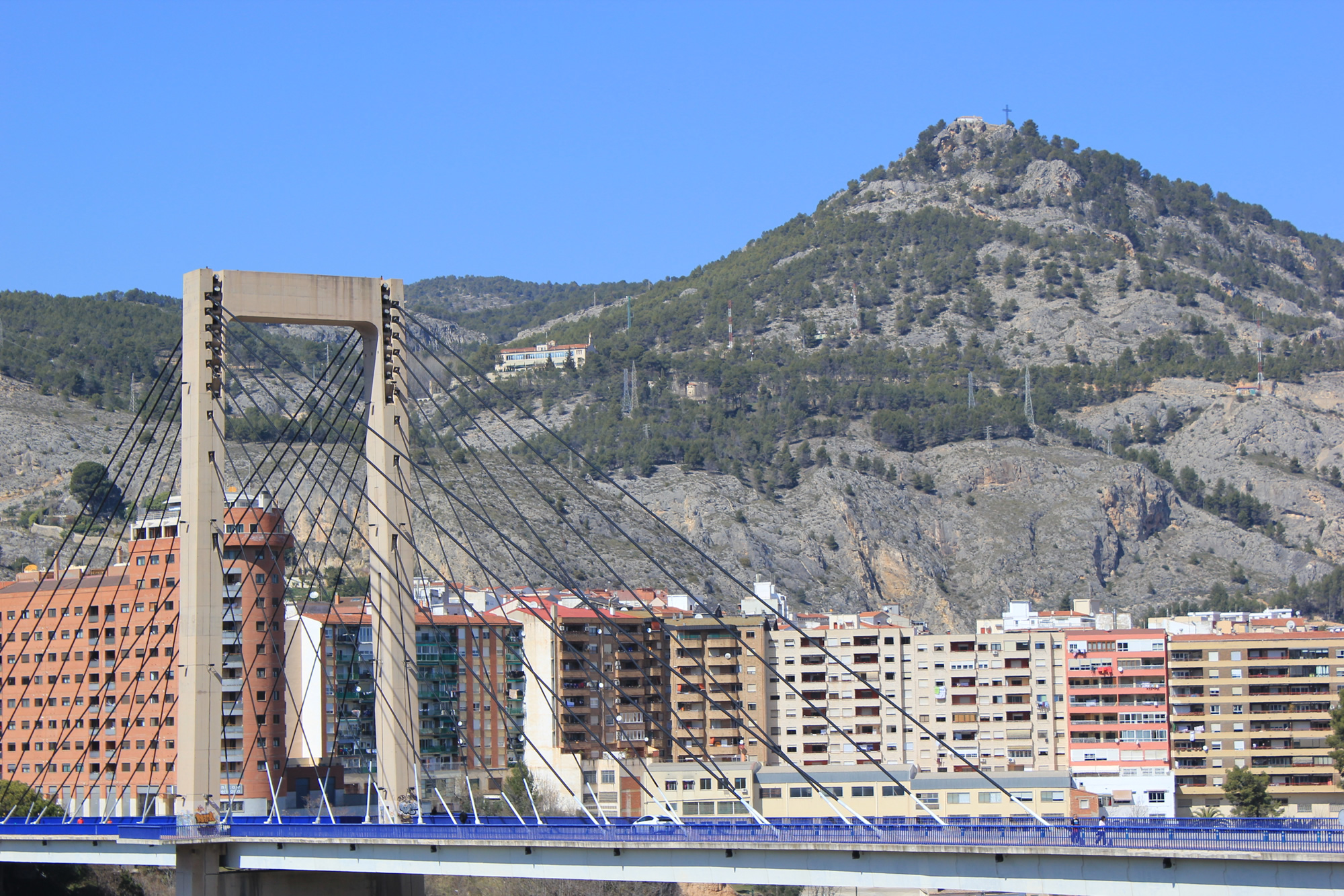 Vista panorámica de la ciudad de Alcoy con el puente Fernando Reig en primer plano.